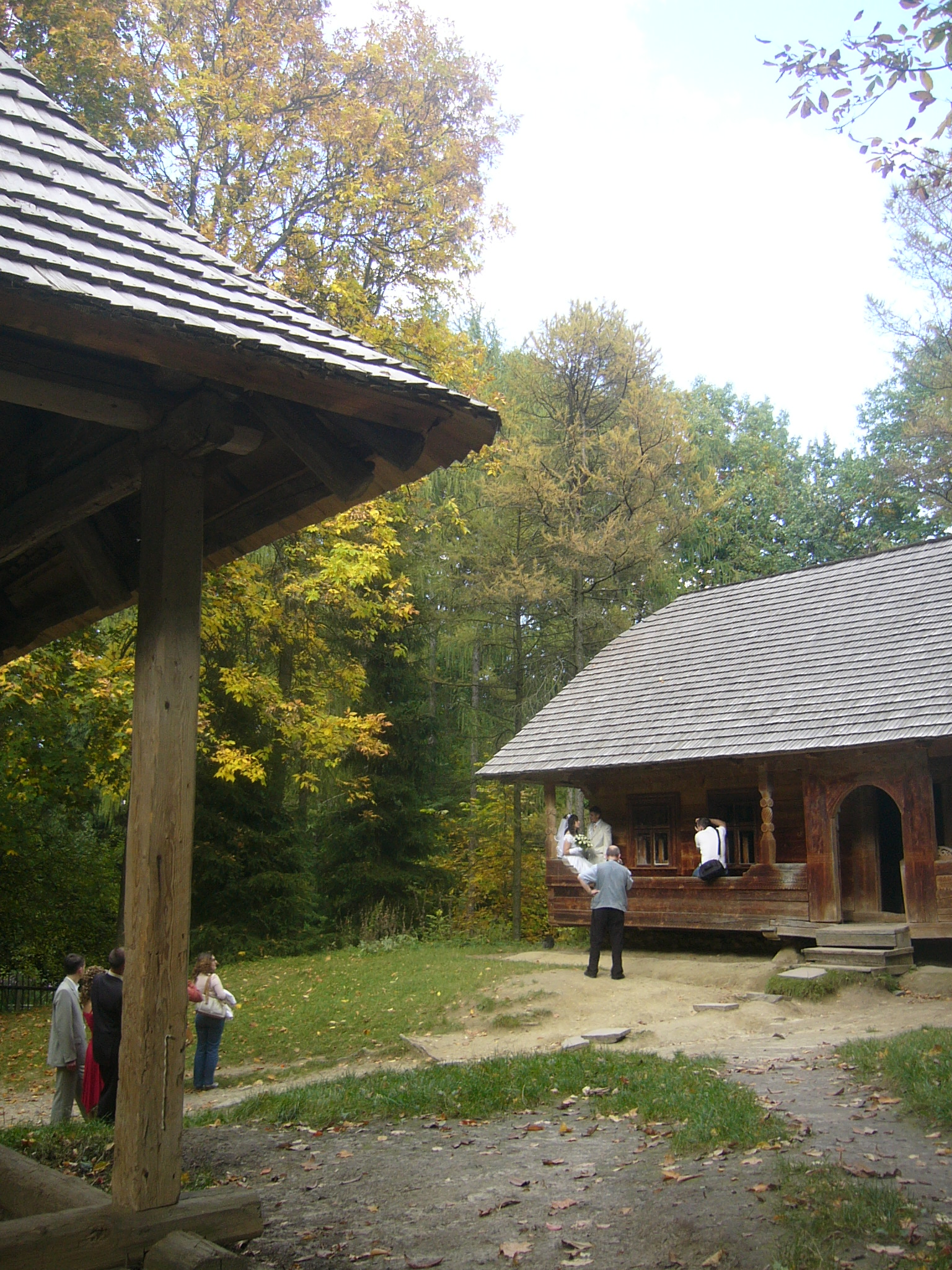 ШевченківськийГай4.jpg: львівський скансен "шевченківський гай"